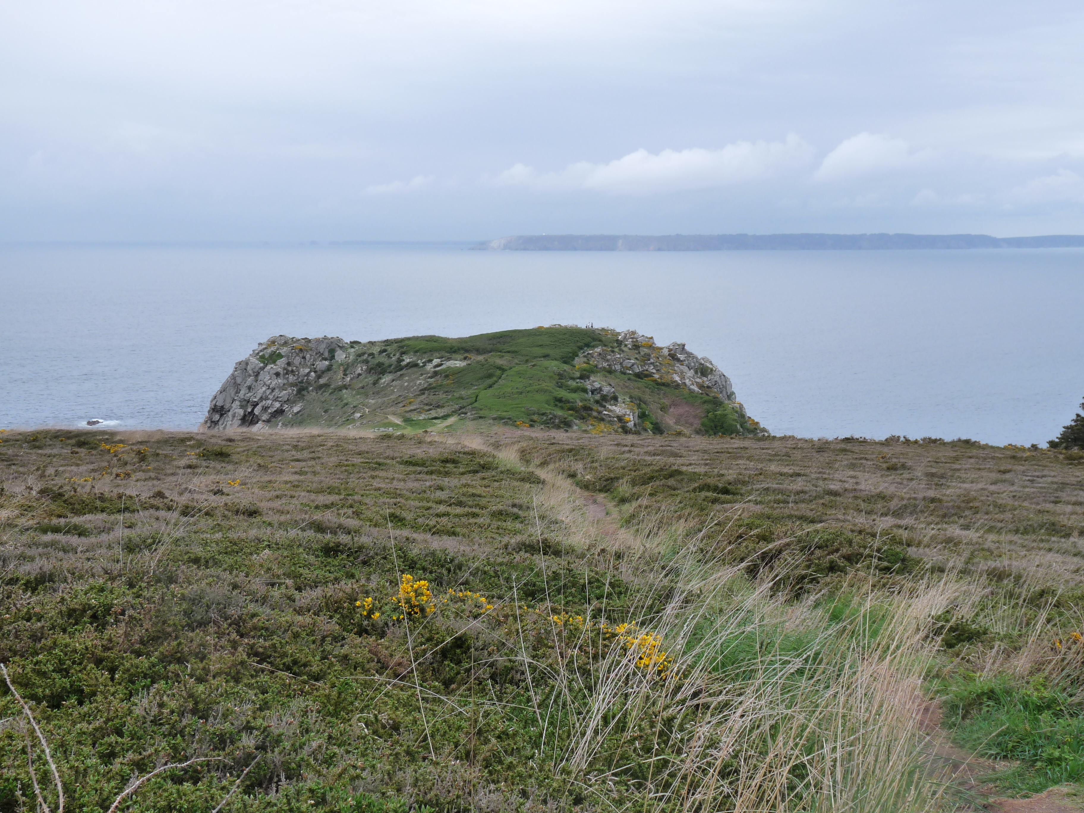 Site naturel protégé de Kastel Koz à Beuzec-Cap-Sizun (Finistère). Au loin, le cap de la Chèvre (presqu'île de Crozon)